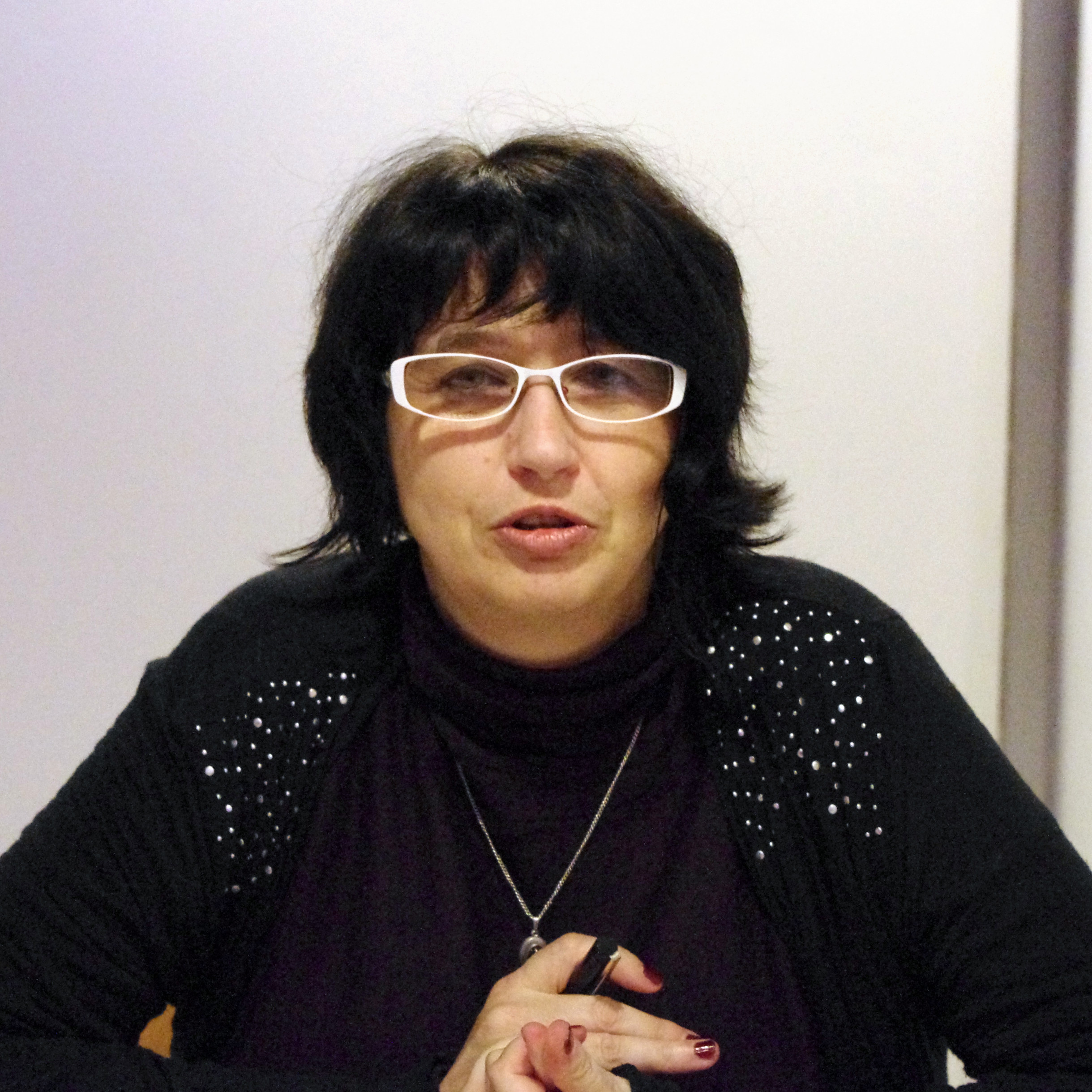 Utopiales 2011, Sylvie Denis, 2011-10-11, by Alvaro